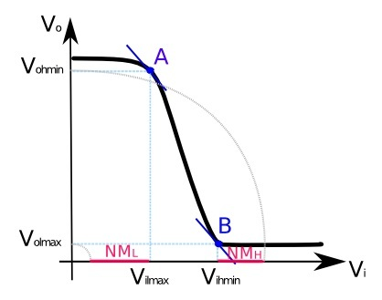 Tipica caratteristica Vo/Vi di un inveritore con descrizione del margine di immunità ai disturbi(NM)